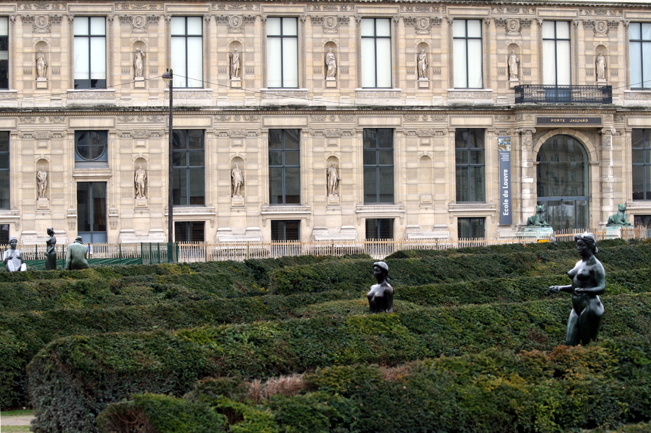 Ecole du Louvre